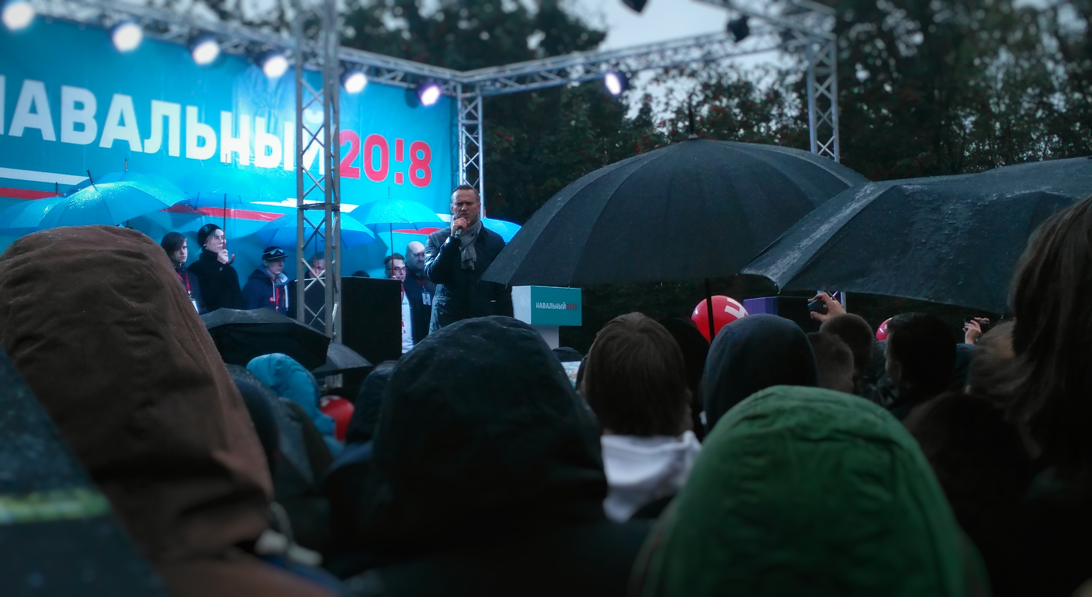 Алексей Навальный, посетивший город Мурманск в рамках своего осеннего тура по городам России, с предвыборной кампанией.